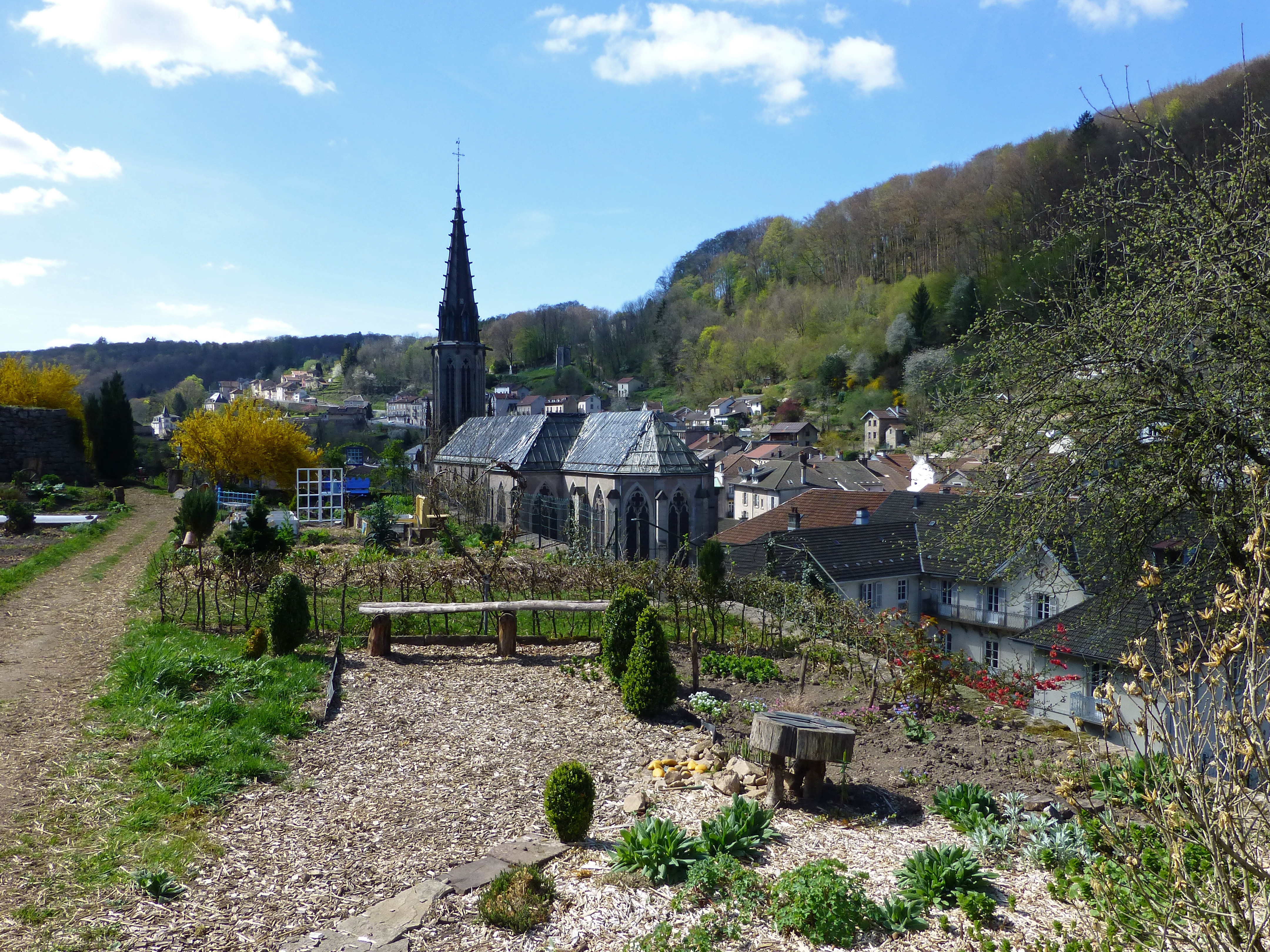 Plombières-les-Bains (Vosges) : l'église Saint-Amé vue depuis les Jardins en terrasses